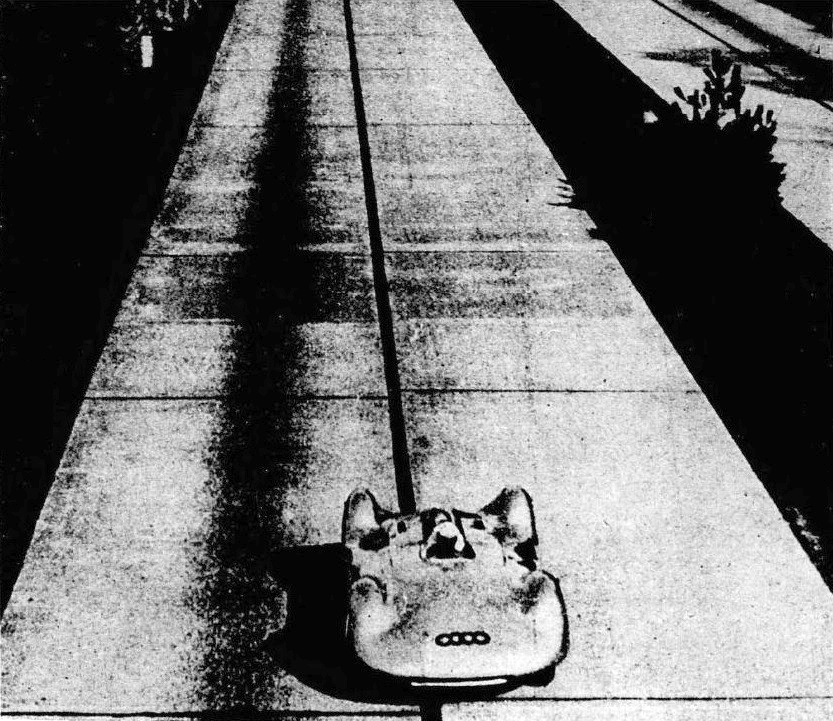 Bernd Rosemeyer en 1937 sur l'autostrade Frankfort-Darmstadt (406.320 km/h).